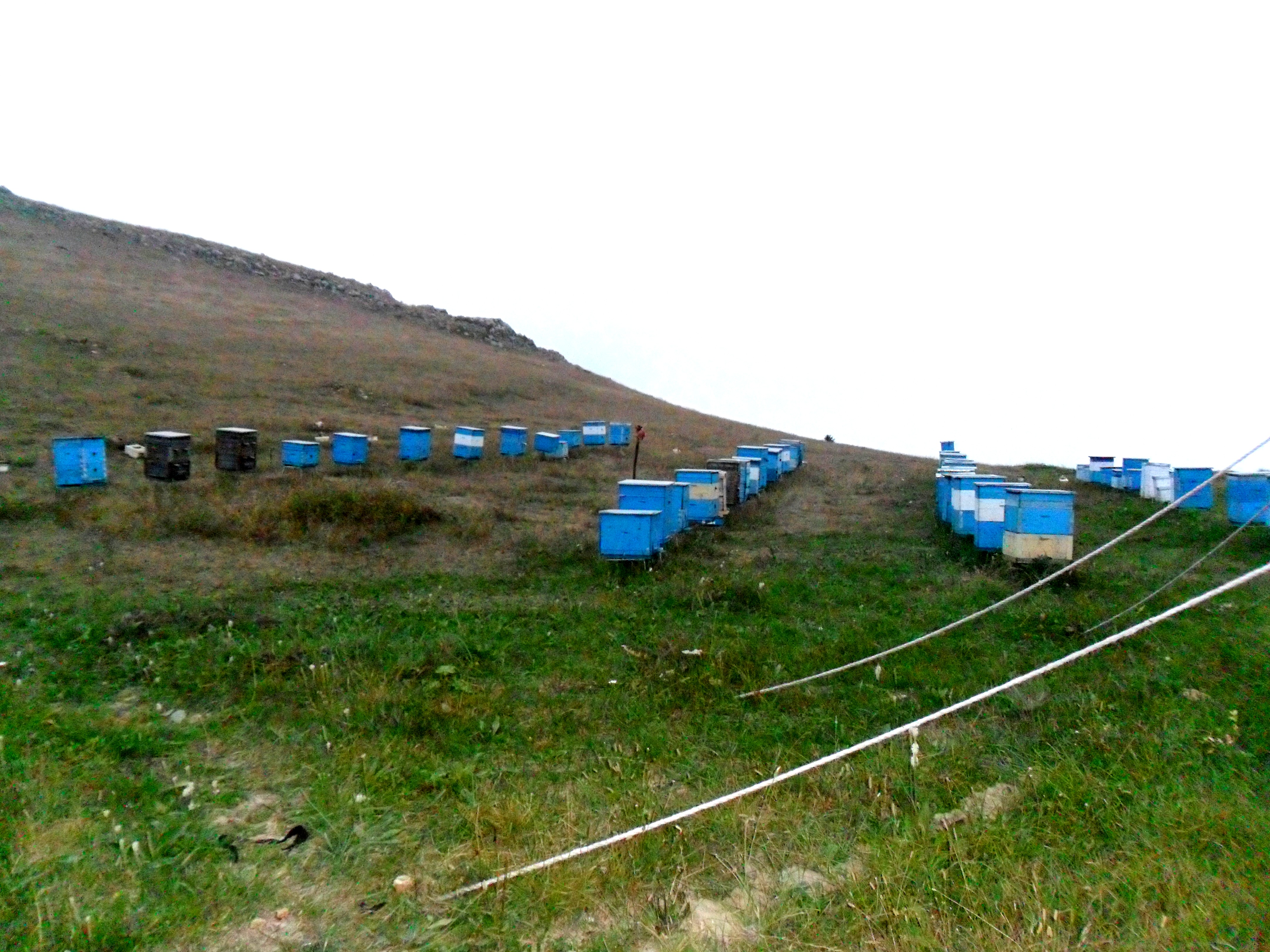 Cek kəndi